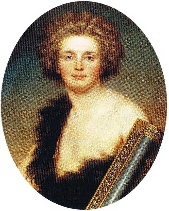 Hovimies Gustaf Mauritz Armfelt skyyttiläisen sankarin asuun pukeutuneena. Muotokuva on maalattu kuningas Kustaa III:n seurueen vieraillessa Pariisissa. Wertmüller maalasi muotokuvasta myös vaihtoehtoisen version, jossa Armfeltin paljas rinta oli verhoiltu liivillä.